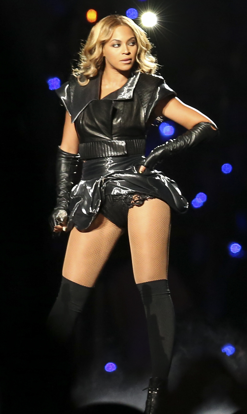 DW2Q0596